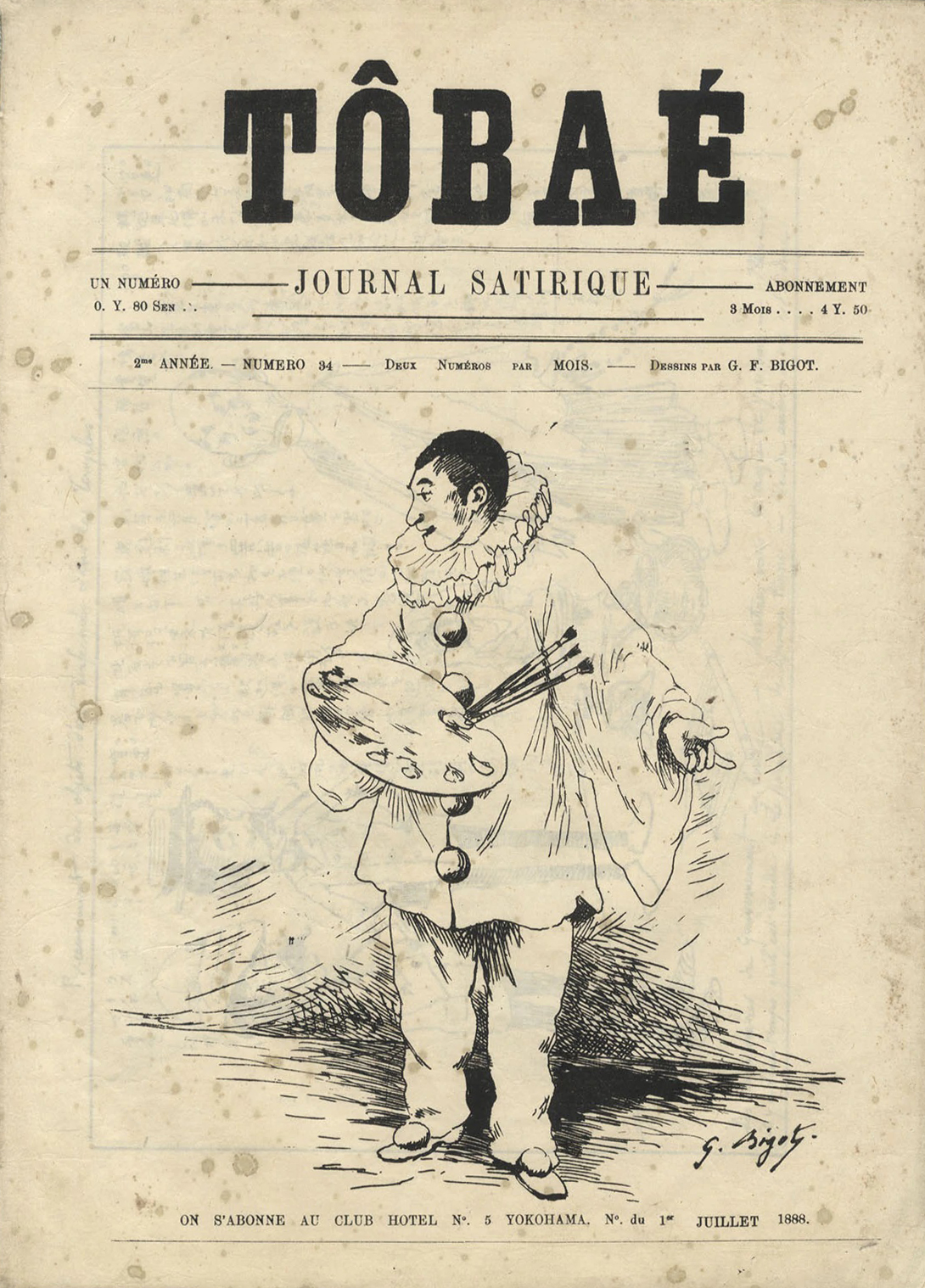 Couverture de Tôbaé, Numéro 6.